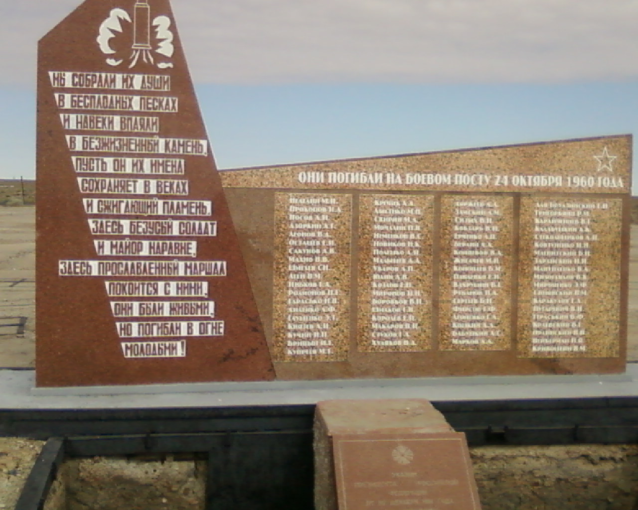 Мемориал погибшим испытателям на 41 площадке космодрома Байконур